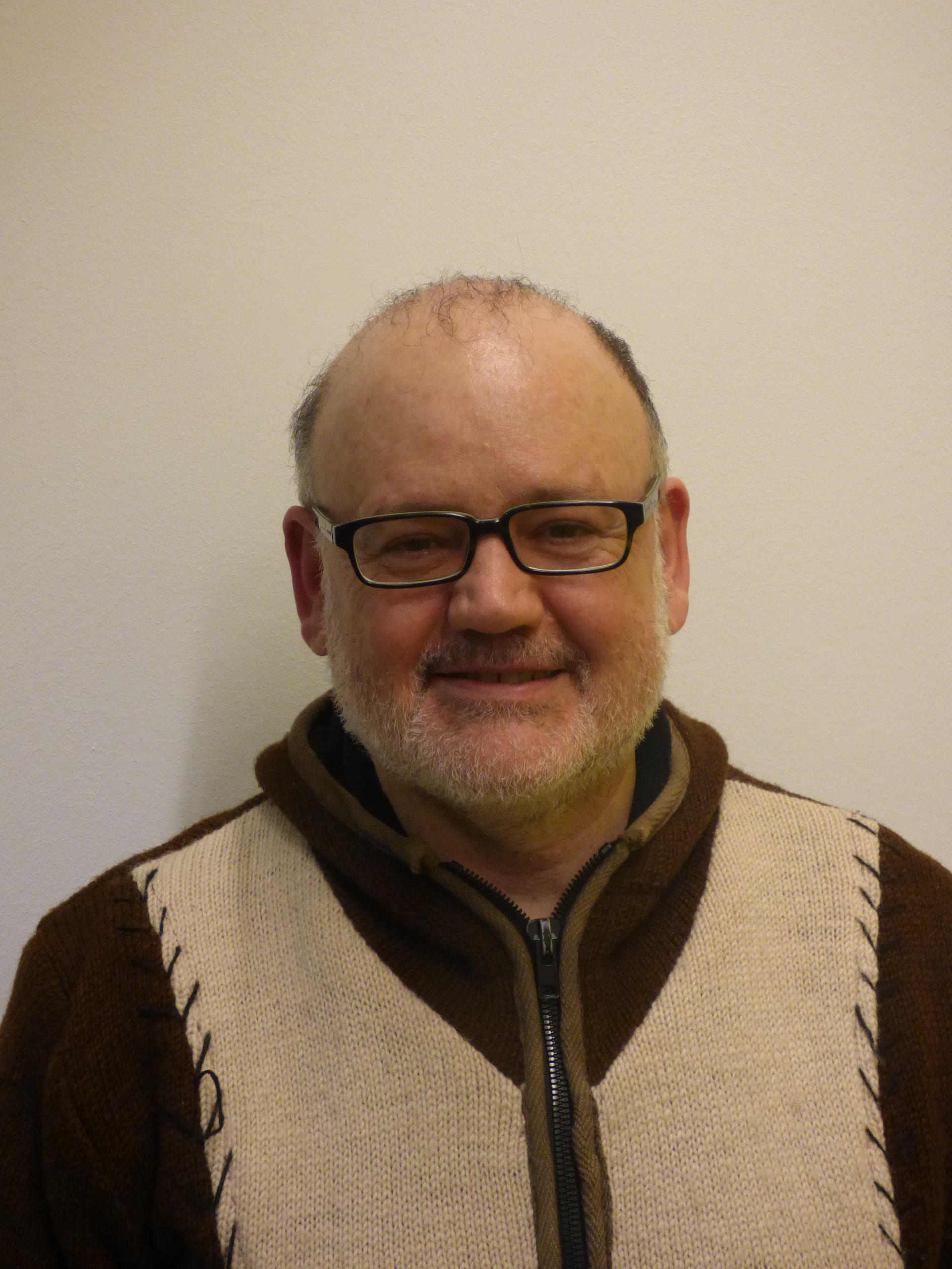 Lluís-Anton Baulenas el 2018